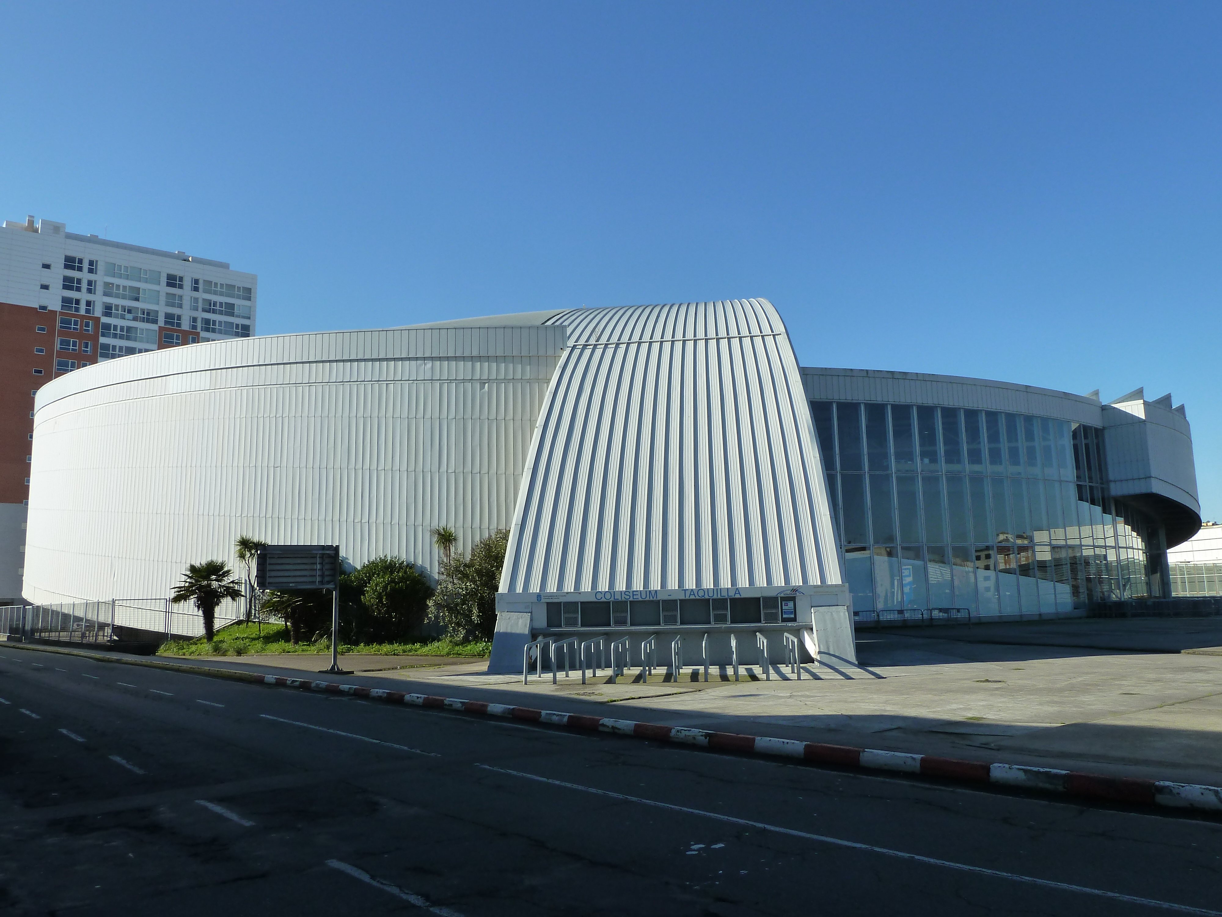 Vista frontal, co arranque do arco central, do Coliseum da Coruña.